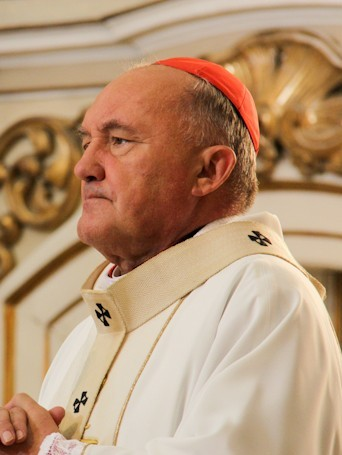 Kardynał Kazimierz Nycz